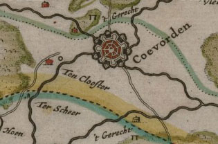 Detail van een oude kaart van Drenthe uit 1634: Coevorden met beide galgenbergen